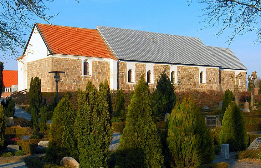 fra sydvest